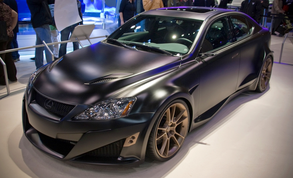 lexus is f